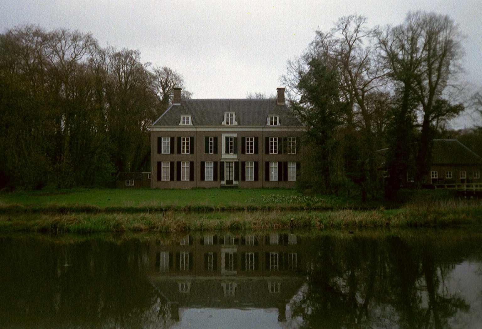 Oud Amelisweerd, Koningslaan 9, Bunnik. Op de voorgrond de Kromme Rijn. Foto genomen op 11 april 2004 en geupload door maker.